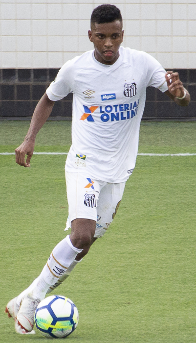 Foto: Douglas Teixeira/Futebol Santista